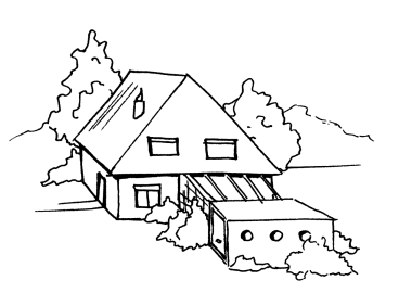 Einfamilienhaus, mit angebauter Garage und Pergola. (c)2003 by Evelyne Erbsland Permission is granted to copy, distribute and/or modify this document under the terms of the GNU Free Documentation License, Version 1.2 or any later version published by the Free Software Foundation. Gescannt und nachbearbeitet mit GIMP